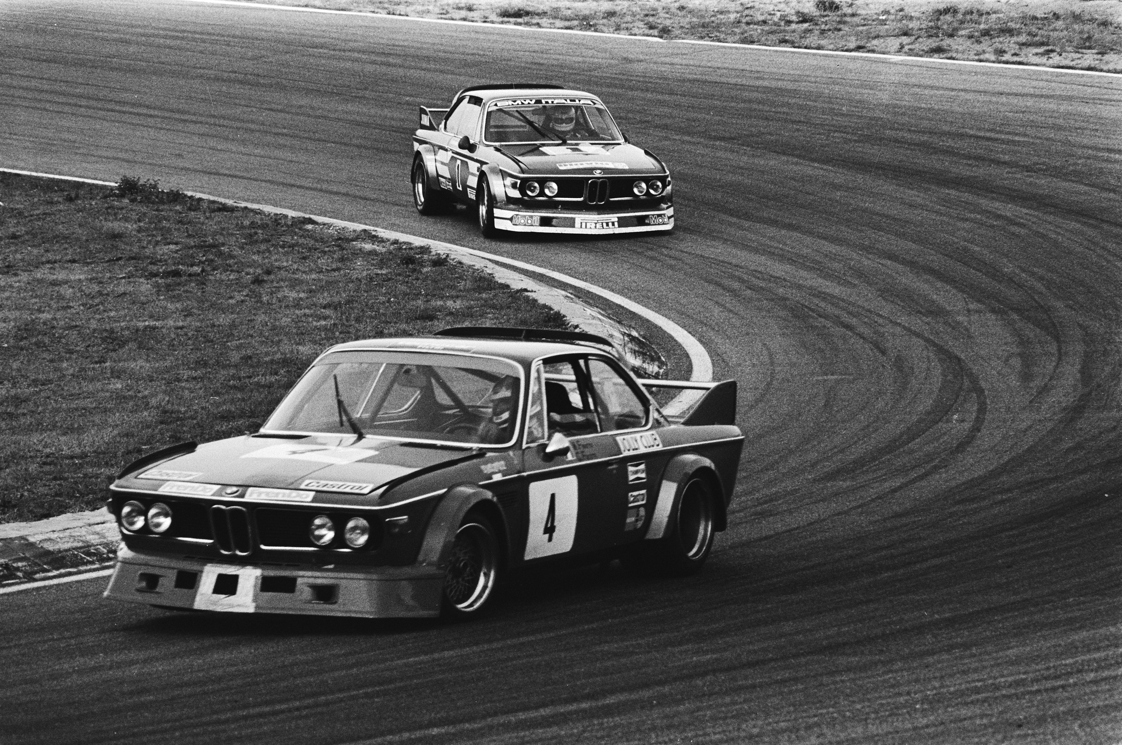 Collectie / Archief : Fotocollectie Anefo Reportage / Serie : [ onbekend ] Beschrijving : Zandvoort Trophy 4 uursrace voor toerwagens; Facetti met BMW op kop (nr. 4), gevolgd door Grano/Joosen eveneens met BMW Datum : 5 augustus 1979 Locatie : Noord-Holland, Zandvoort Trefwoorden : autoraces Fotograaf : Croes, Rob C. / Anefo Auteursrechthebbende : Nationaal Archief Materiaalsoort : Negatief (zwart/wit) Nummer archiefinventaris : bekijk toegang 2.24.01.05 Bestanddeelnummer : 930-3860